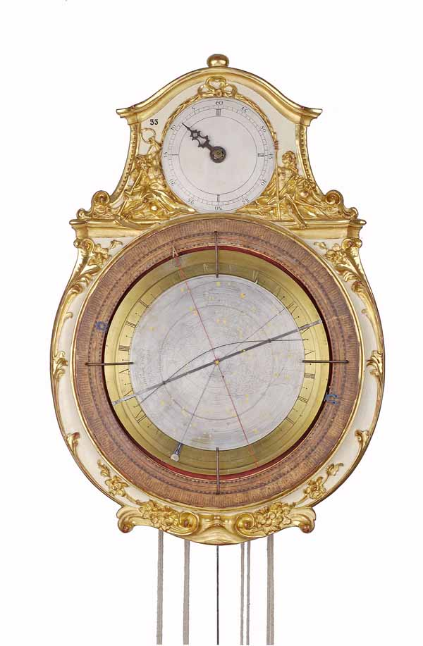 Thaddaeus Rinderle, Kloster St. Peter, 1787 (Deutsches Uhrenmuseum, Inv. 16-0033)